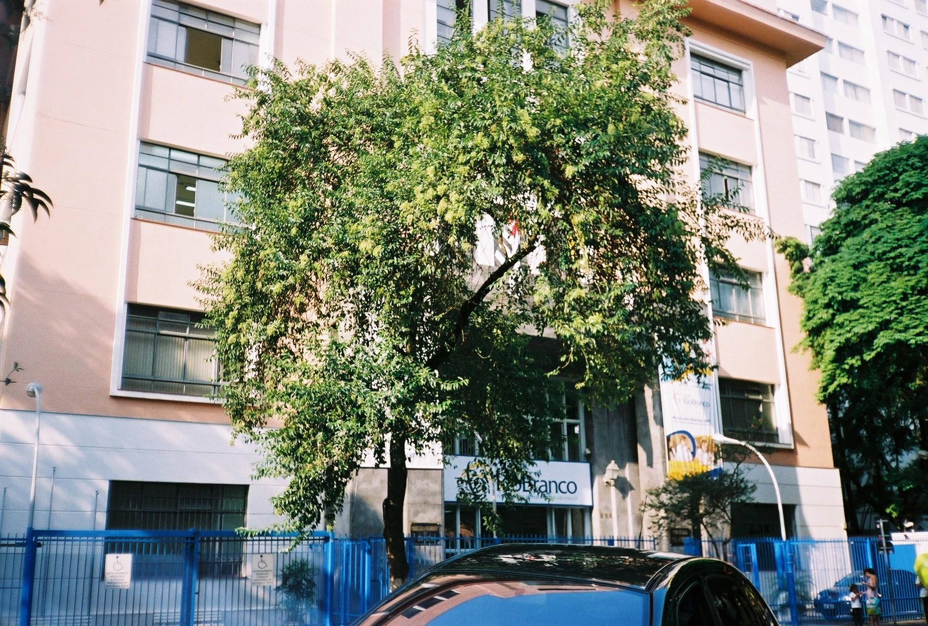 Fotografia do Colégio Rio Branco, na cidade de São Paulo.